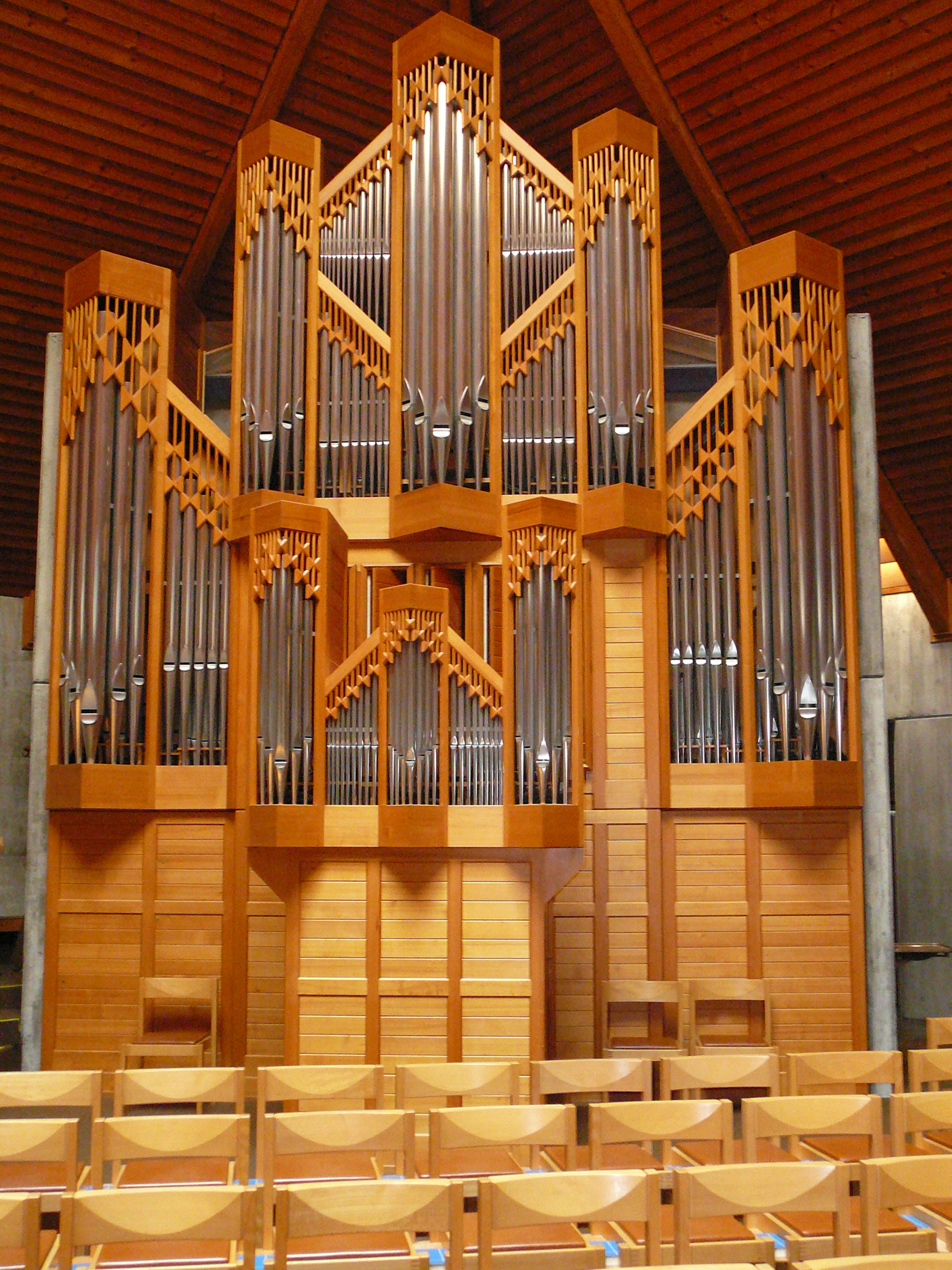 Heilig-Kreuz (Zürich-Altstetten), Orgel